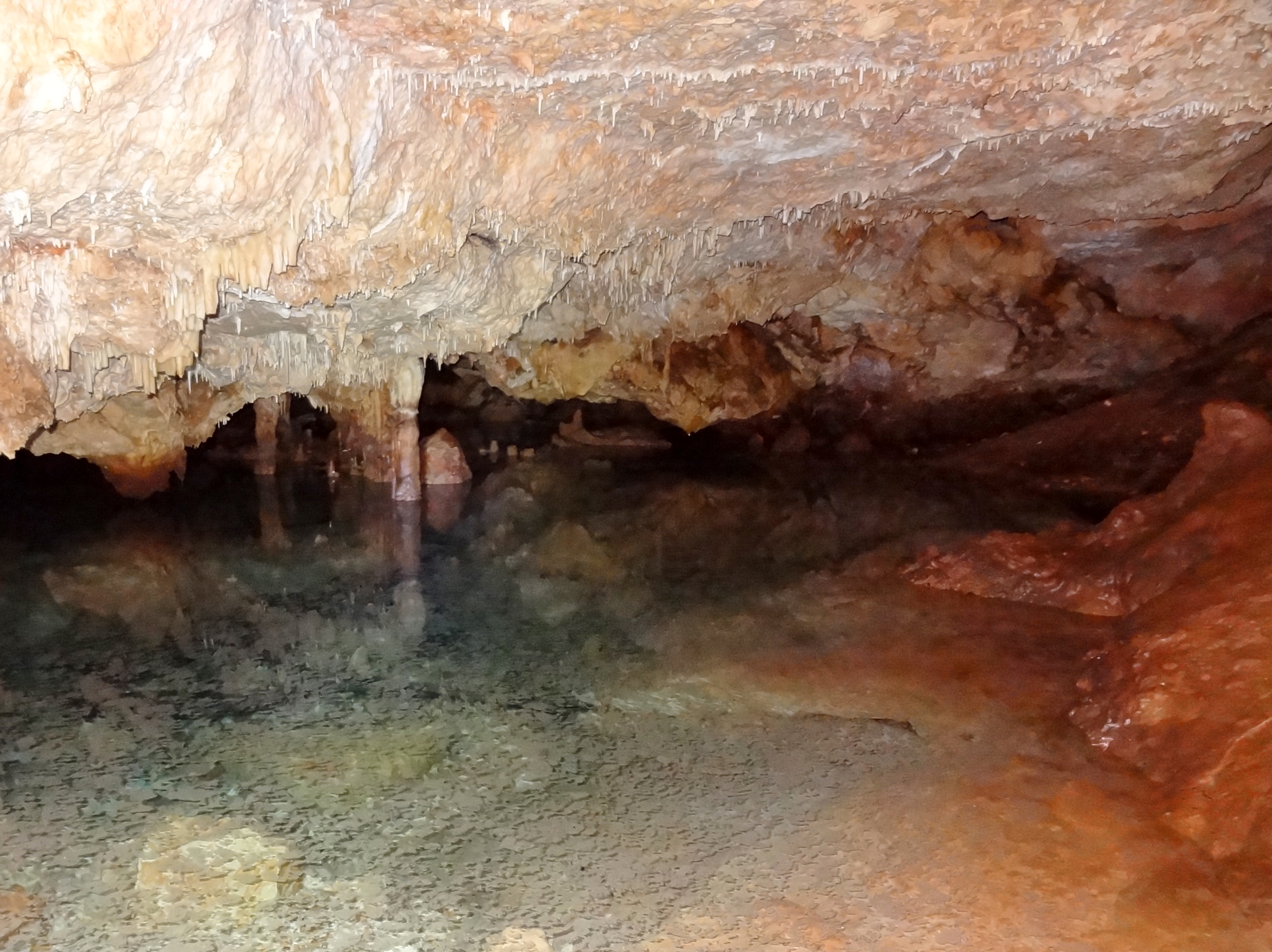 Cova de Cala Falcó an der Ostküste von Mallorca, Spanien